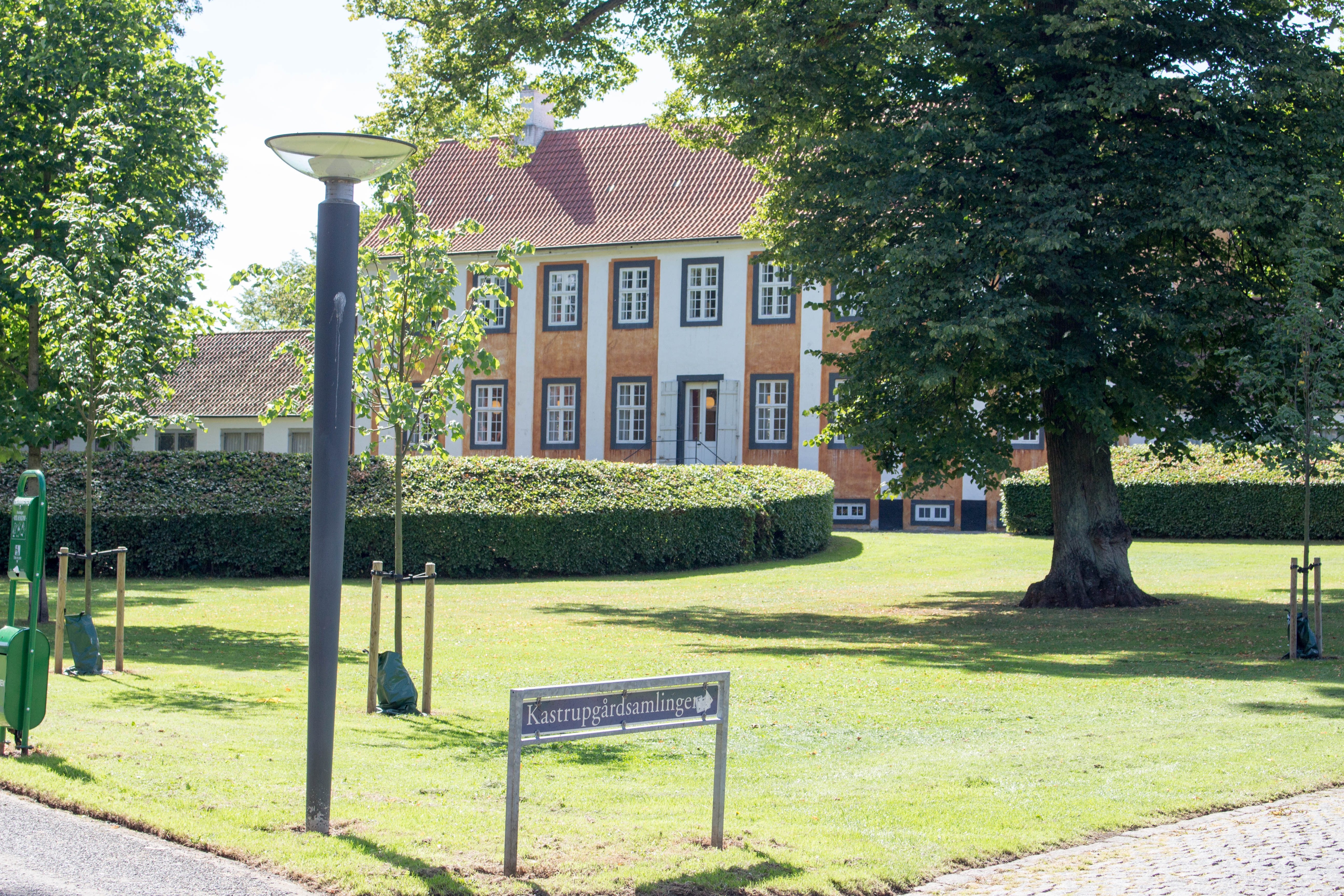 Foto af Kastrupgårdsamlingen fra parken bag museet sommer 2016.